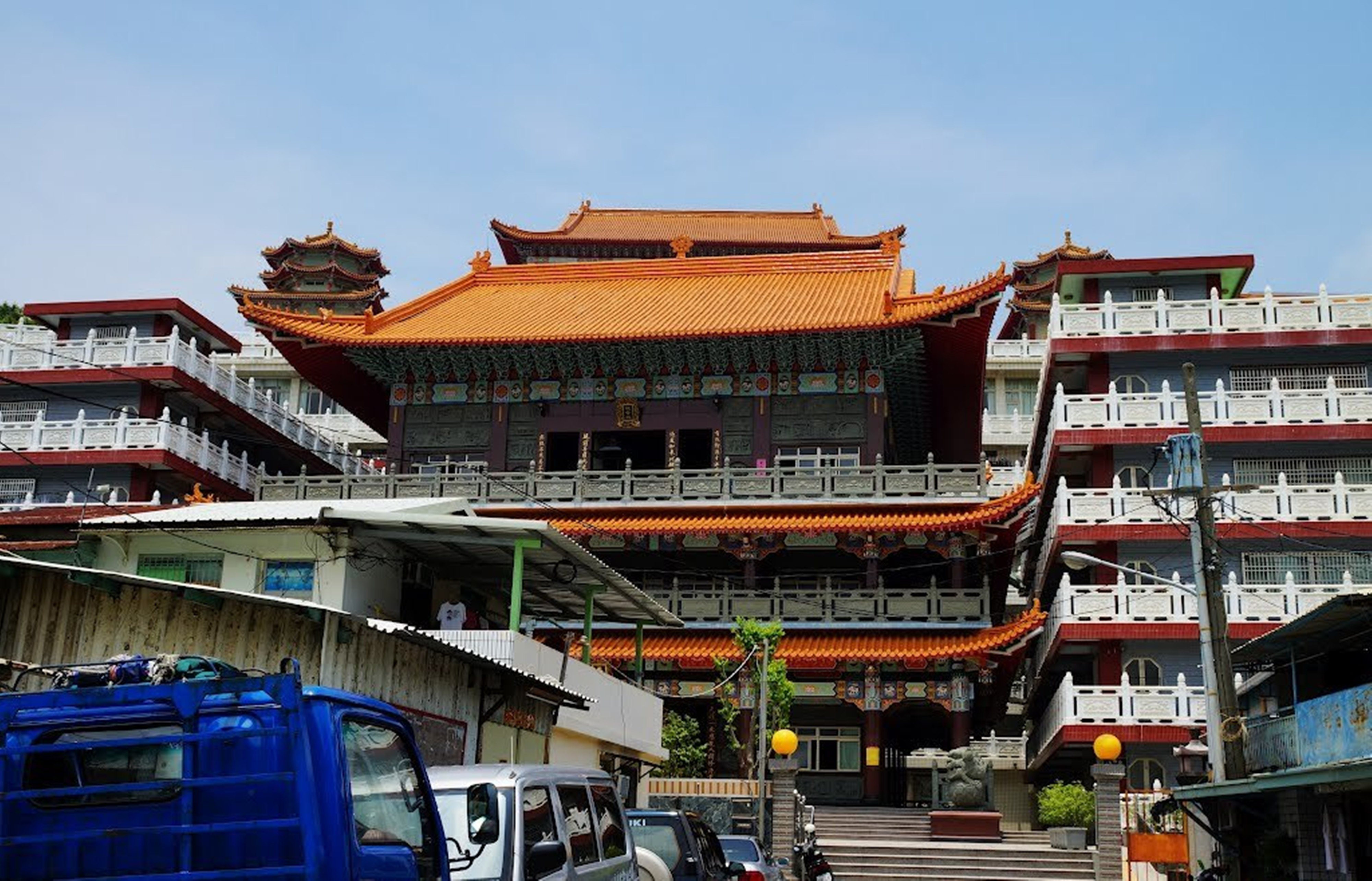 中文（台灣）: 元亨寺舊大殿拆除後新建的觀音殿和天王殿